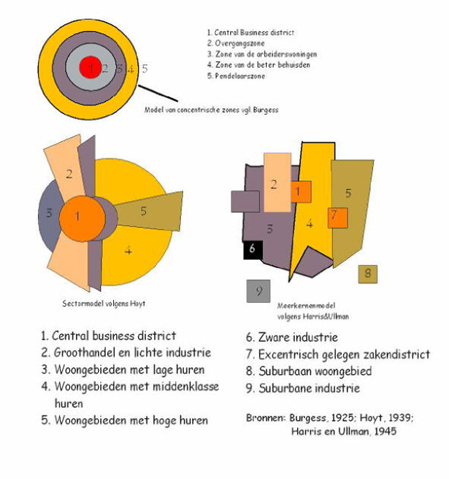 Eigen tekening van de klassieke stadsgeledingenmodellen van Burgess, Hoyt en Harris&Ullman